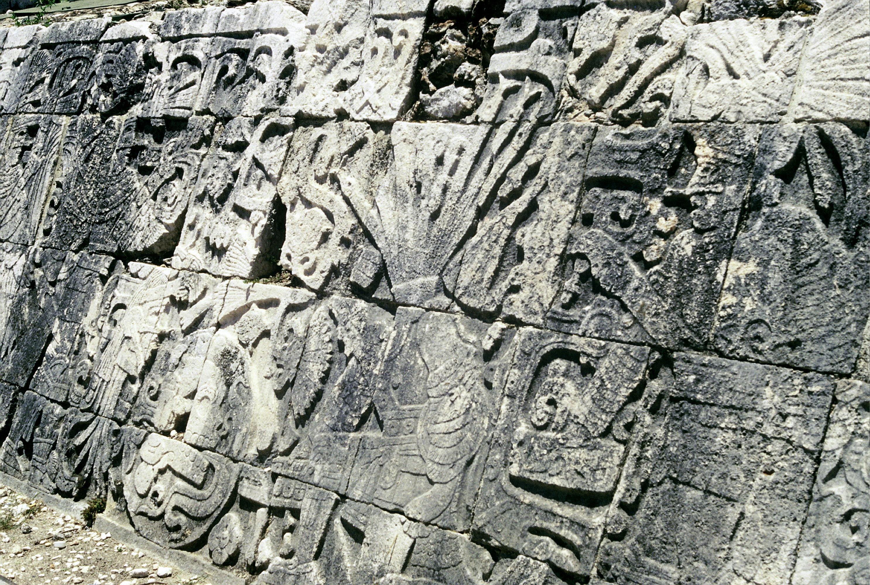 Chichen Itza, bassorilievi al campo della pelota